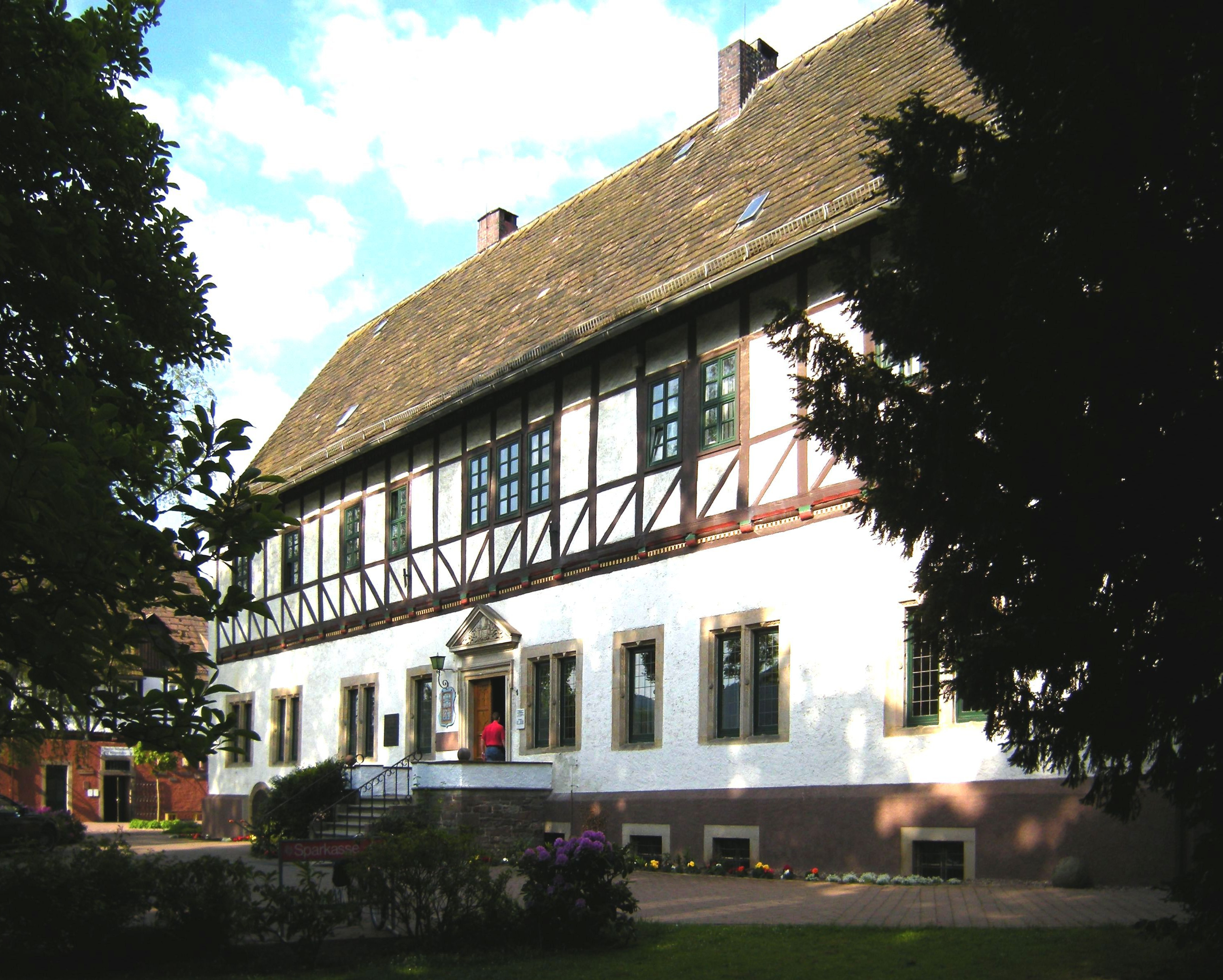 Bodenwerder-Rathaus.jpg